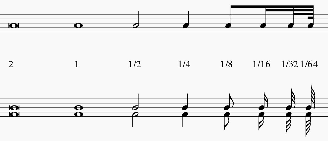 Notenwerte und deren Schreibweise im System